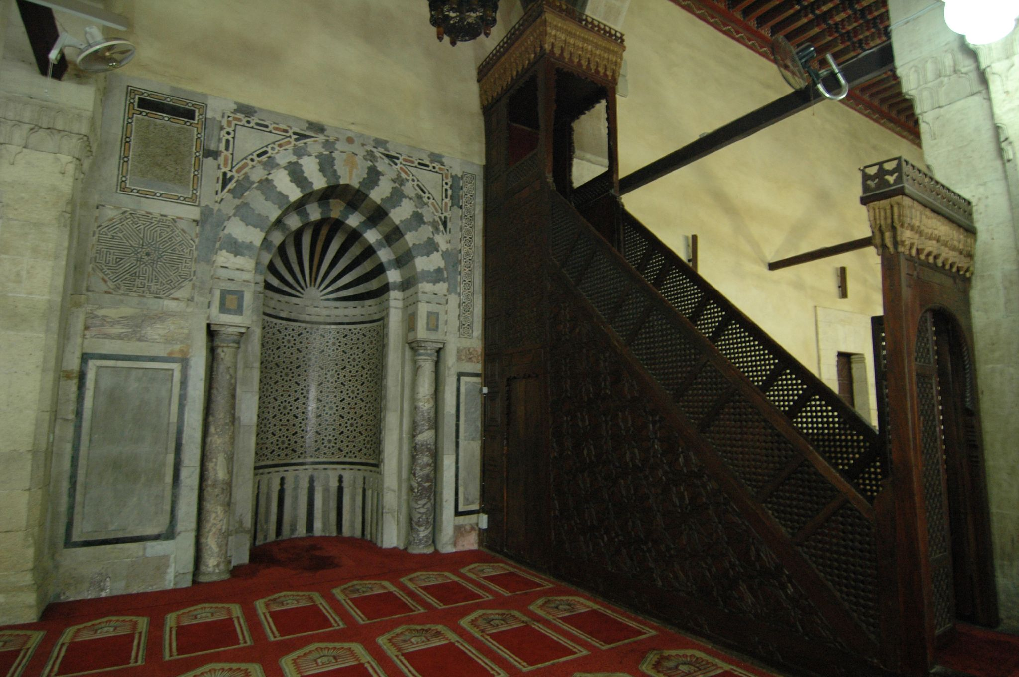 Mihrab at Al-Azhar Mosque